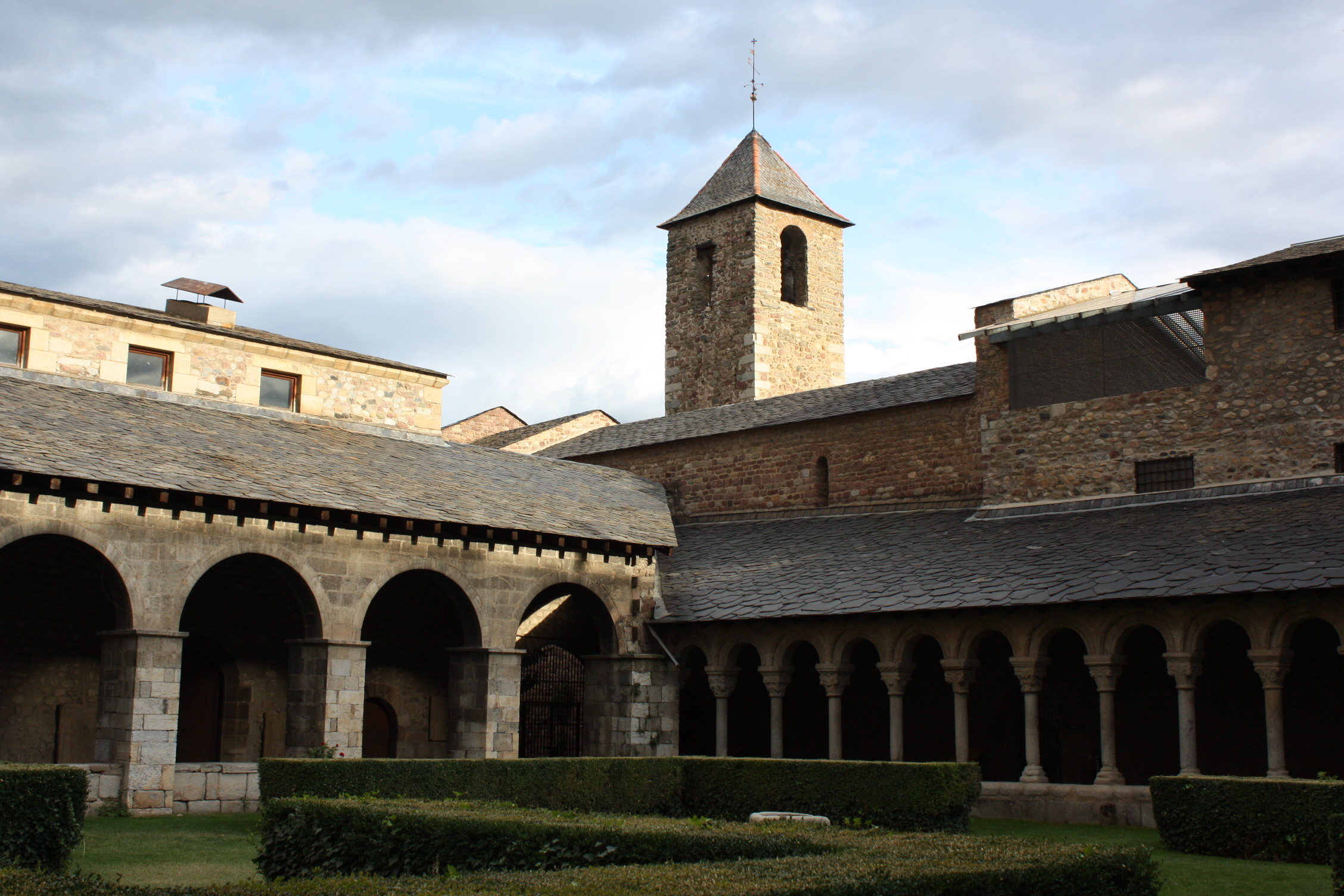 Església de Sant Miquel i el claustre de la Catedral d'Urgell